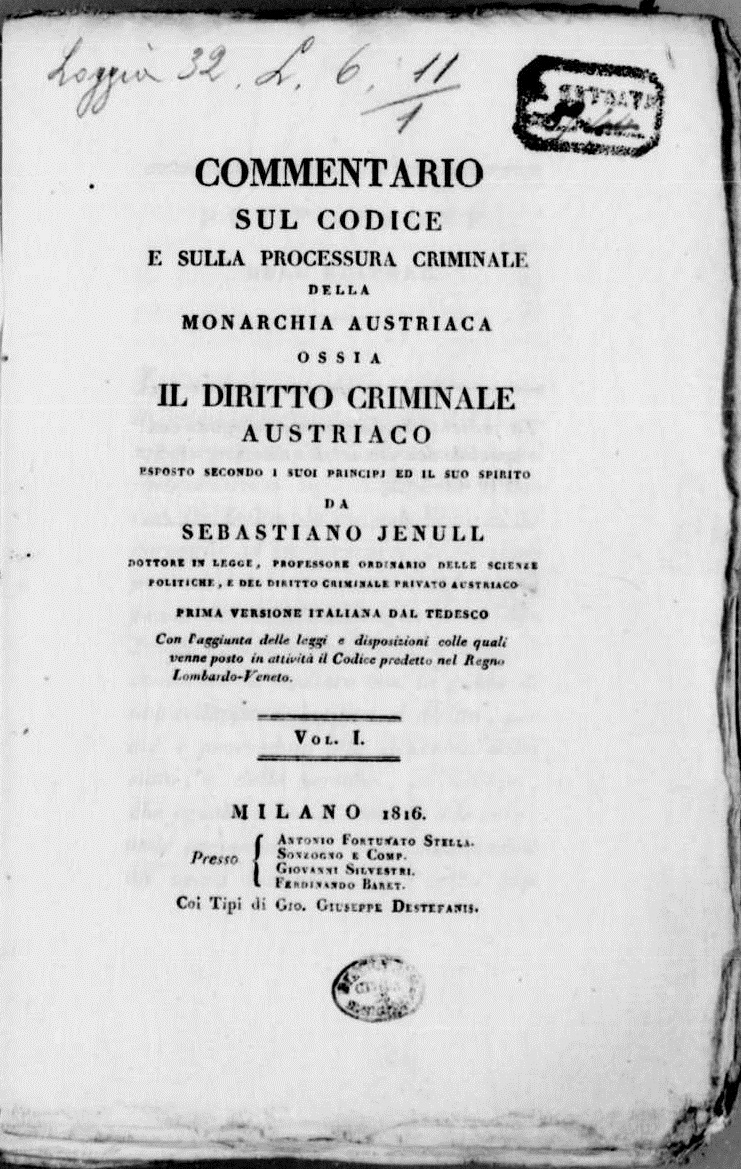 Frontespizio